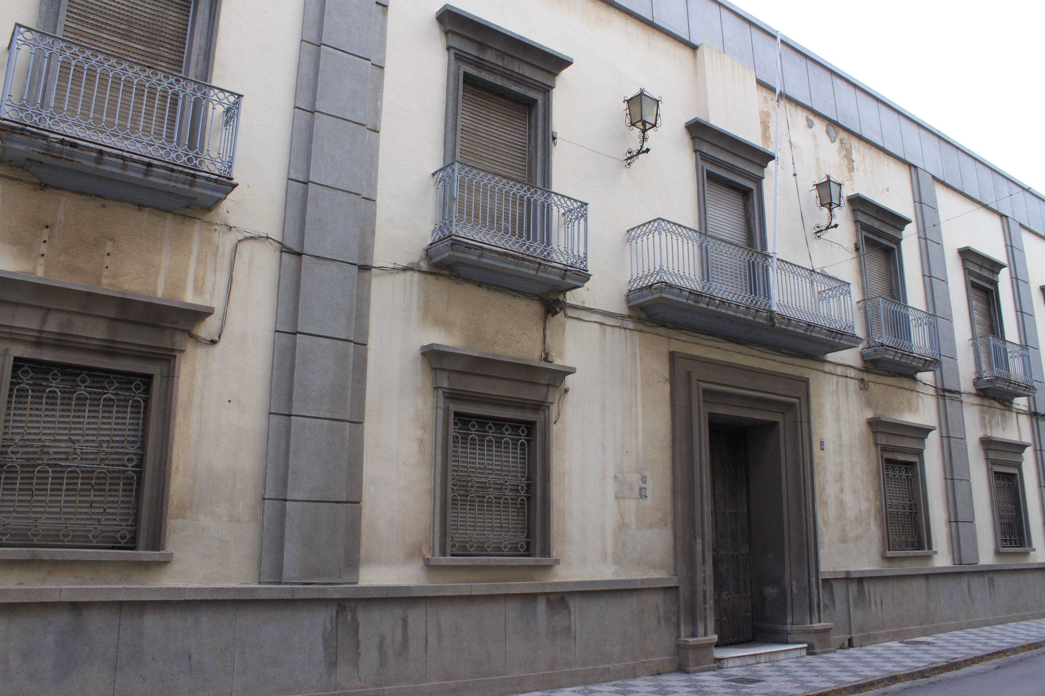 Antigua sede del Gobierno militar de Algeciras situada en la plaza General Martí Barroso, popularmente la Plaza de los Caballos. Este edificio, originalmente construido como cuartel de Caballería, fue ocupado por la Comandancia General del Campo de Gibraltar desde el año 1872 hasta el año 2009 en el que trasladó a la Residencia Fuerte de Santiago tras perder la Comandancia General gran parte de sus funciones en 2005.